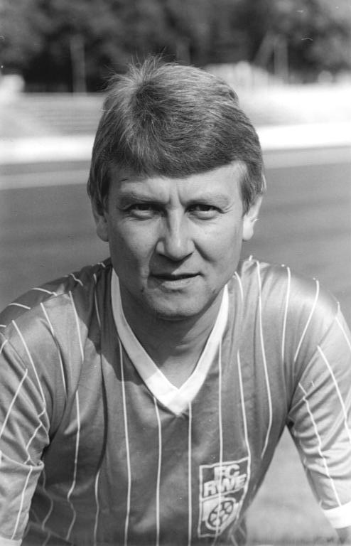 ADN-ZB-Hirndorf-10.8.89-ma-Erfurt: Fußball-Oberliga-Saison 1989-90- Trainer des FC Rot-Weiß Erfurt: Wilfried Gröbner, geboren am 18. Dezember 1949 in Eilenburg.